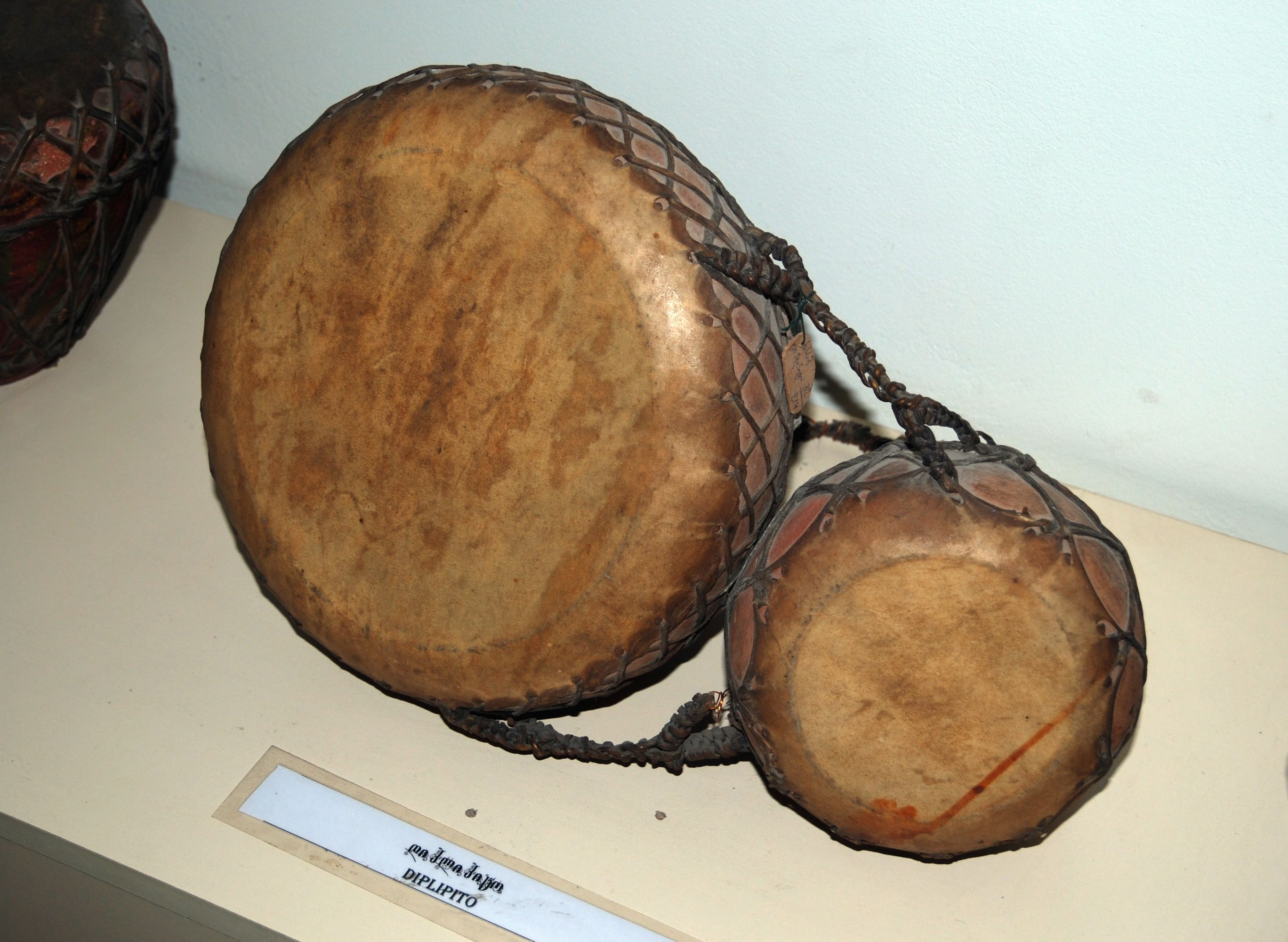 Diplipito, Georgian kettle drum, Tbilisi